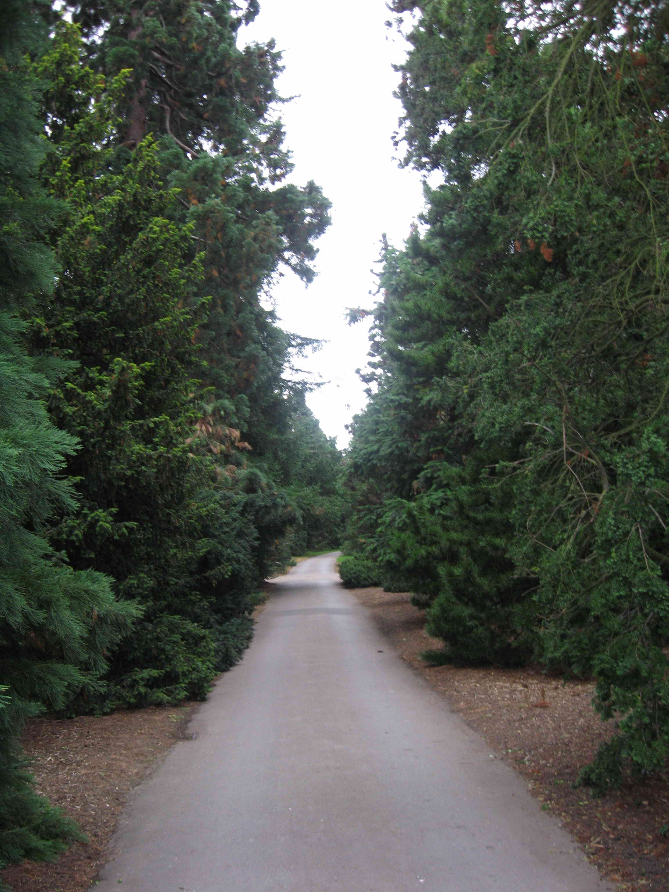 Kew Arborétum